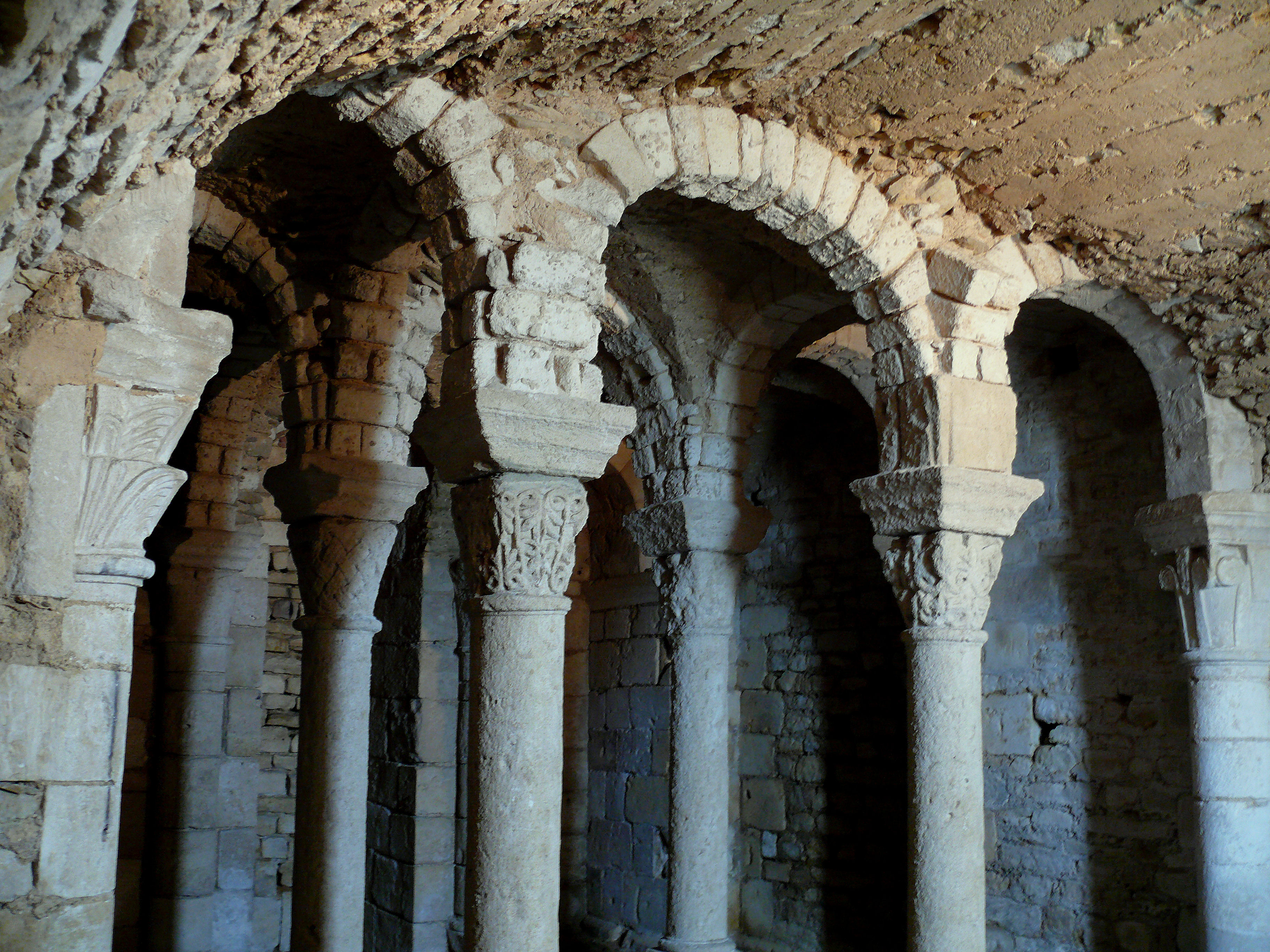 Champdeniers-Saint-Denis - Eglise Notre-Dame - Crypte